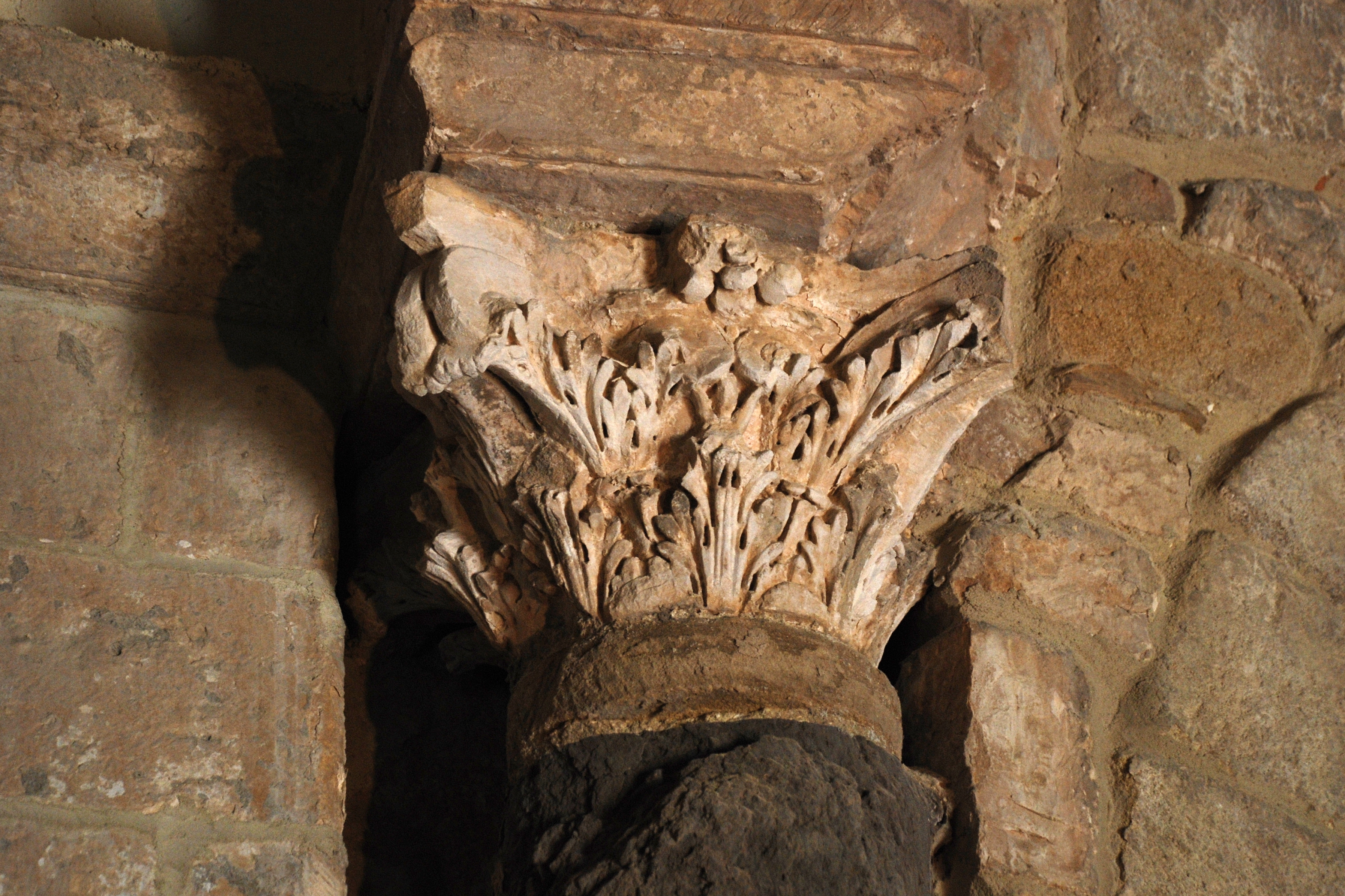 France - Provence - Baptistère de Venasque - chapiteau abside nord